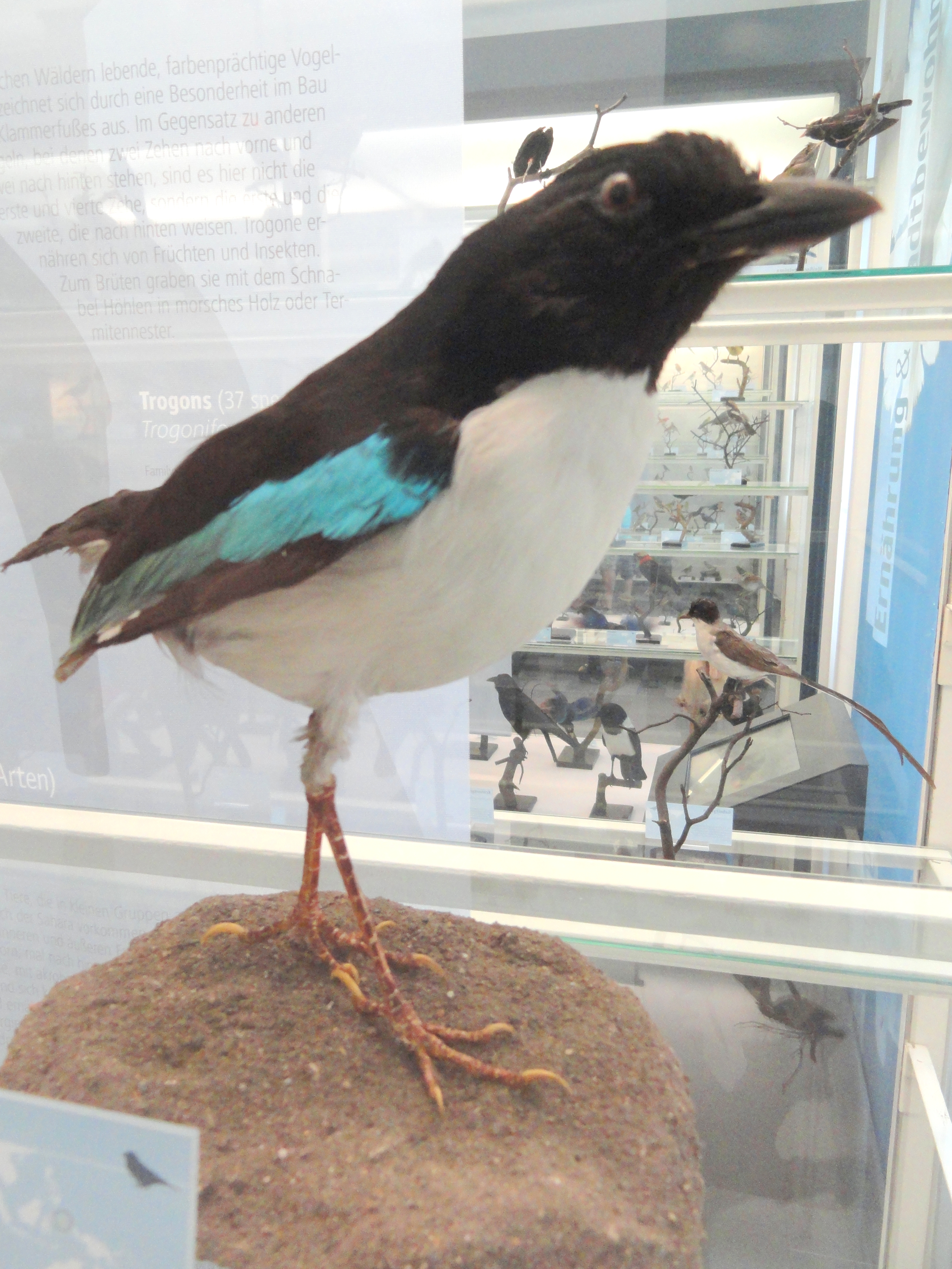 Exhibit in Naturmuseum Senckenberg, Frankfurt am Main, Germany.